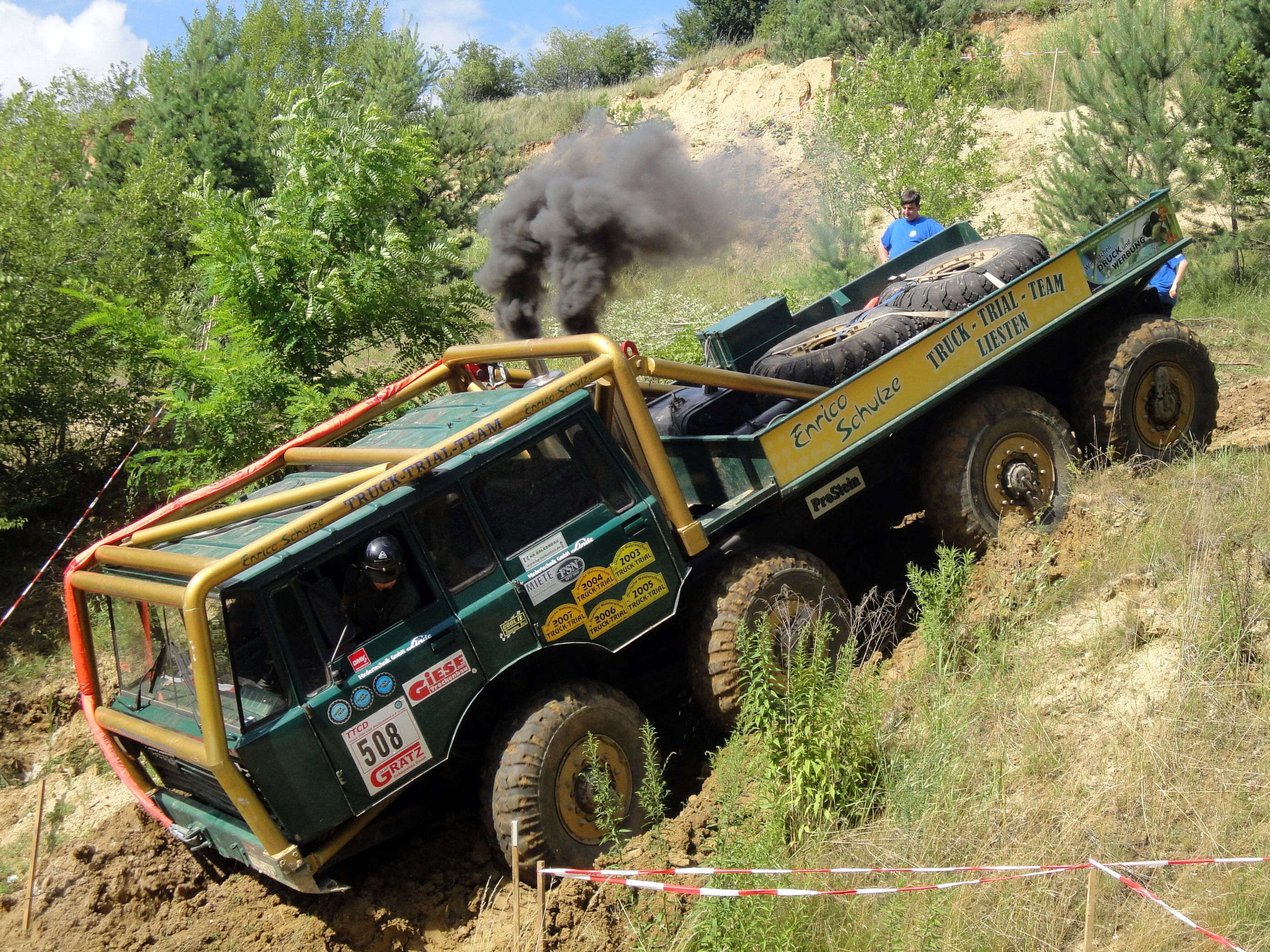 3. Lauf der Internationalen Truck Trial Meisterschaft (ITTM) 2014 in Teuchern: 508 Truck-Trial-Team Liesten Tatra 813